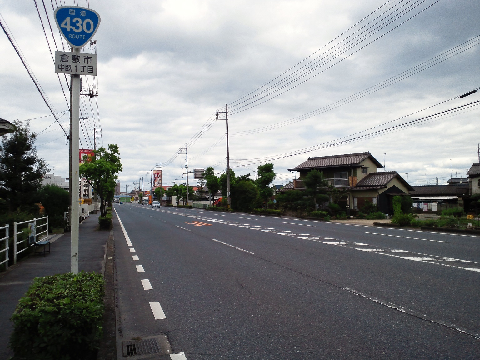 倉敷市中畝付近の国道430号。